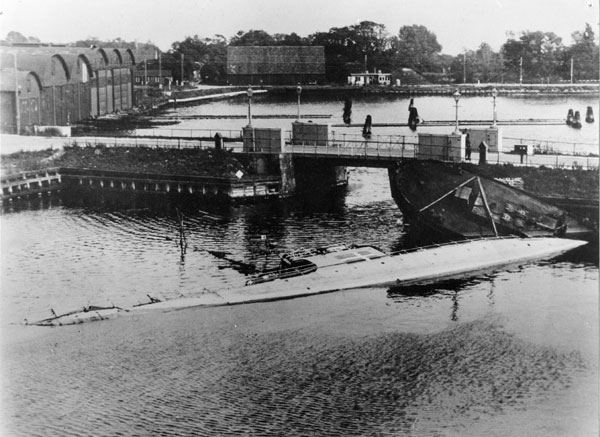 Søbjørnen sunken 0422 at Holmen, 29 August 1934